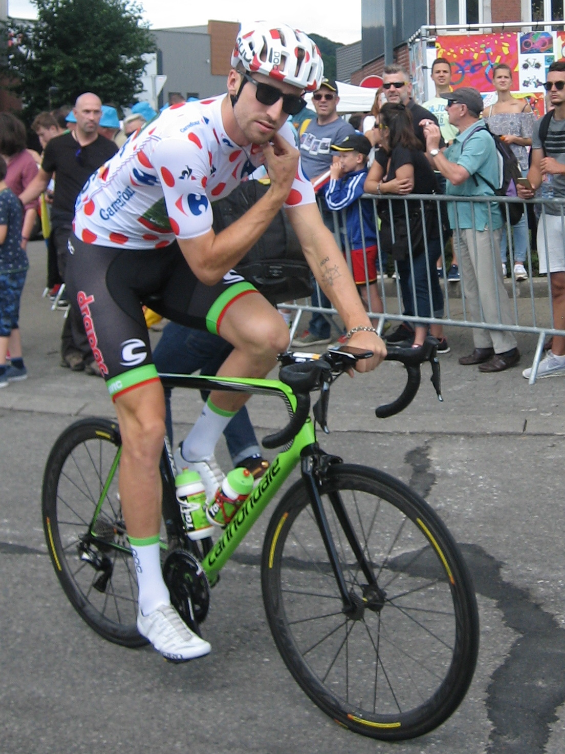 Start in Verviers (België) van de 3e etappe van Le Tour de France 2017.